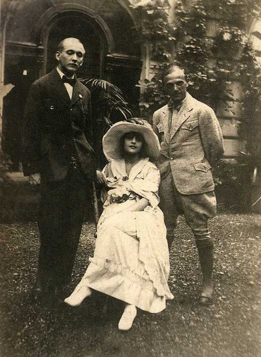 Александр Вертинский, Вера Холодная, Аркадий Бойтлер